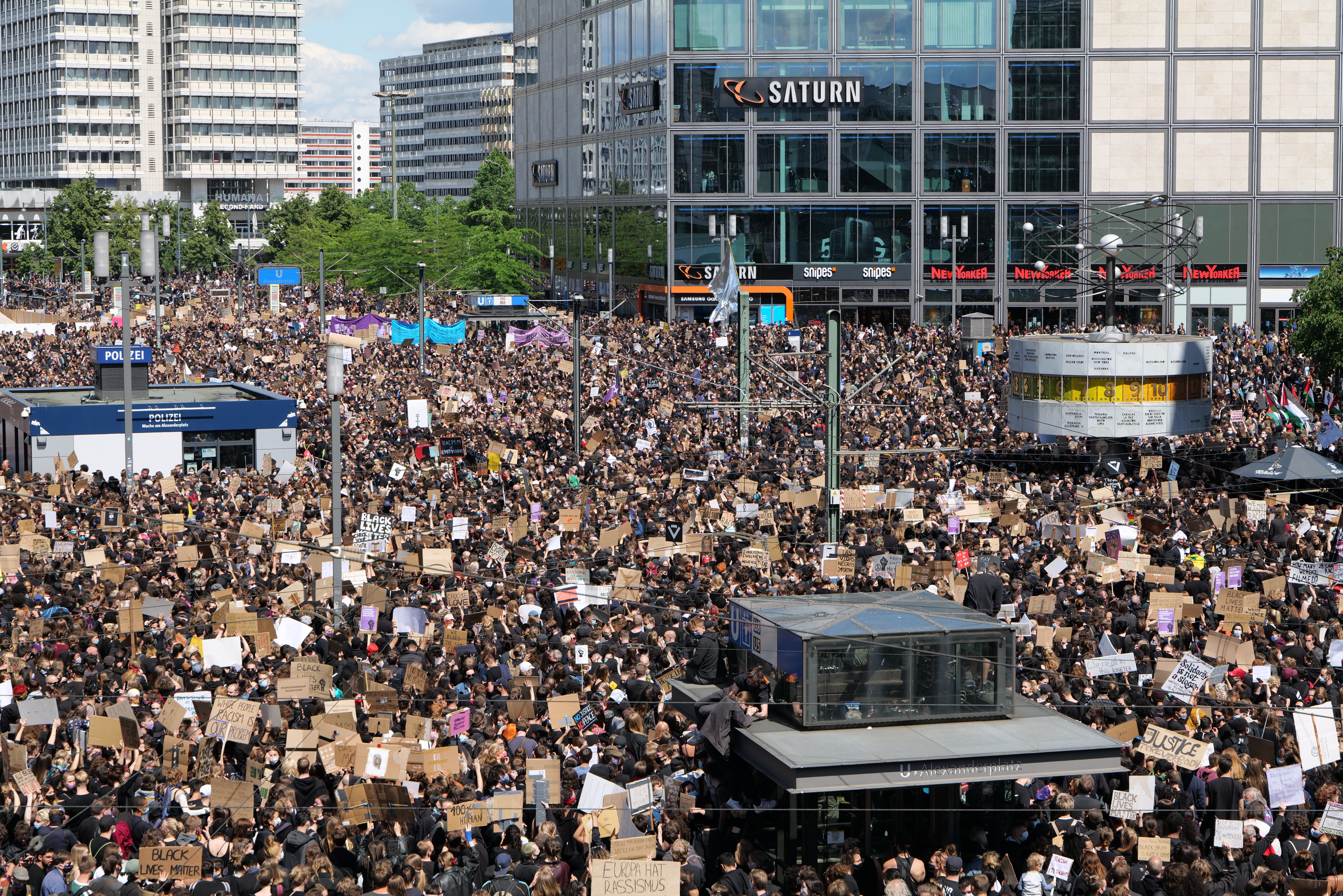 BlackLivesMatter Kundgebung am Alexanderplatz in Berlin am 6. Juni 2020.